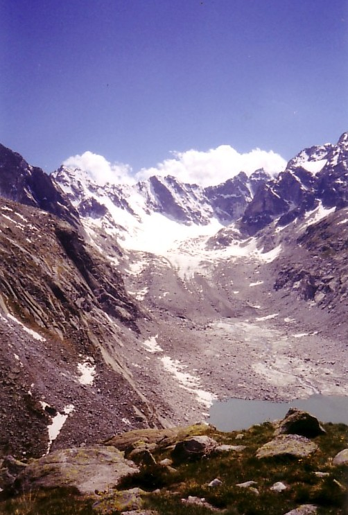 Der Vadrec da l´Albigna (Albignagletscher) mit der Cima della Bondasca 3289m im Hintergrund. Im Vordergrund der Lago da l´Albigna (Albignastausee) in 2163m Höhe.